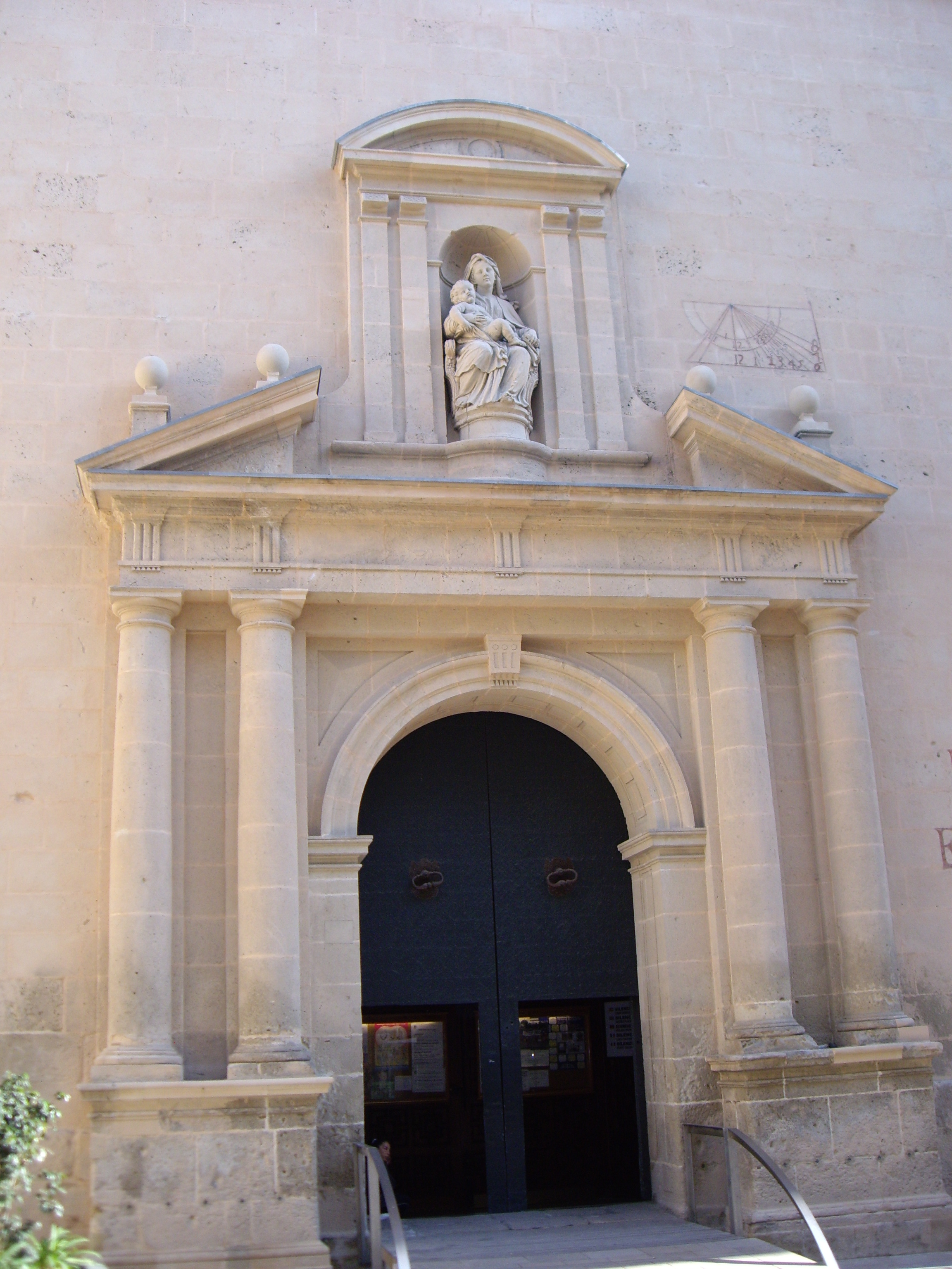 Portada Sant Nicolau